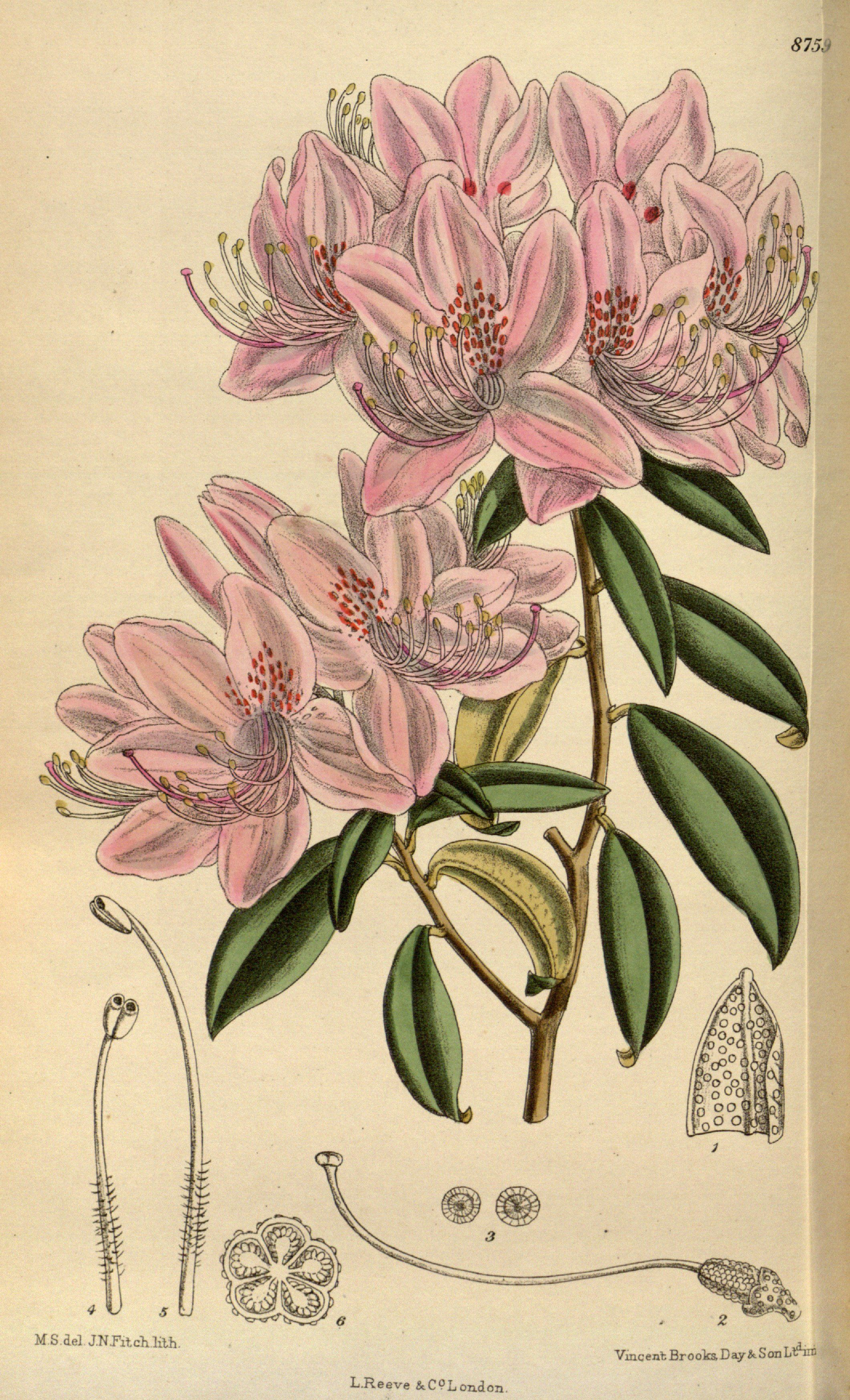 Rhododendron siderophyllum, Ericaceae